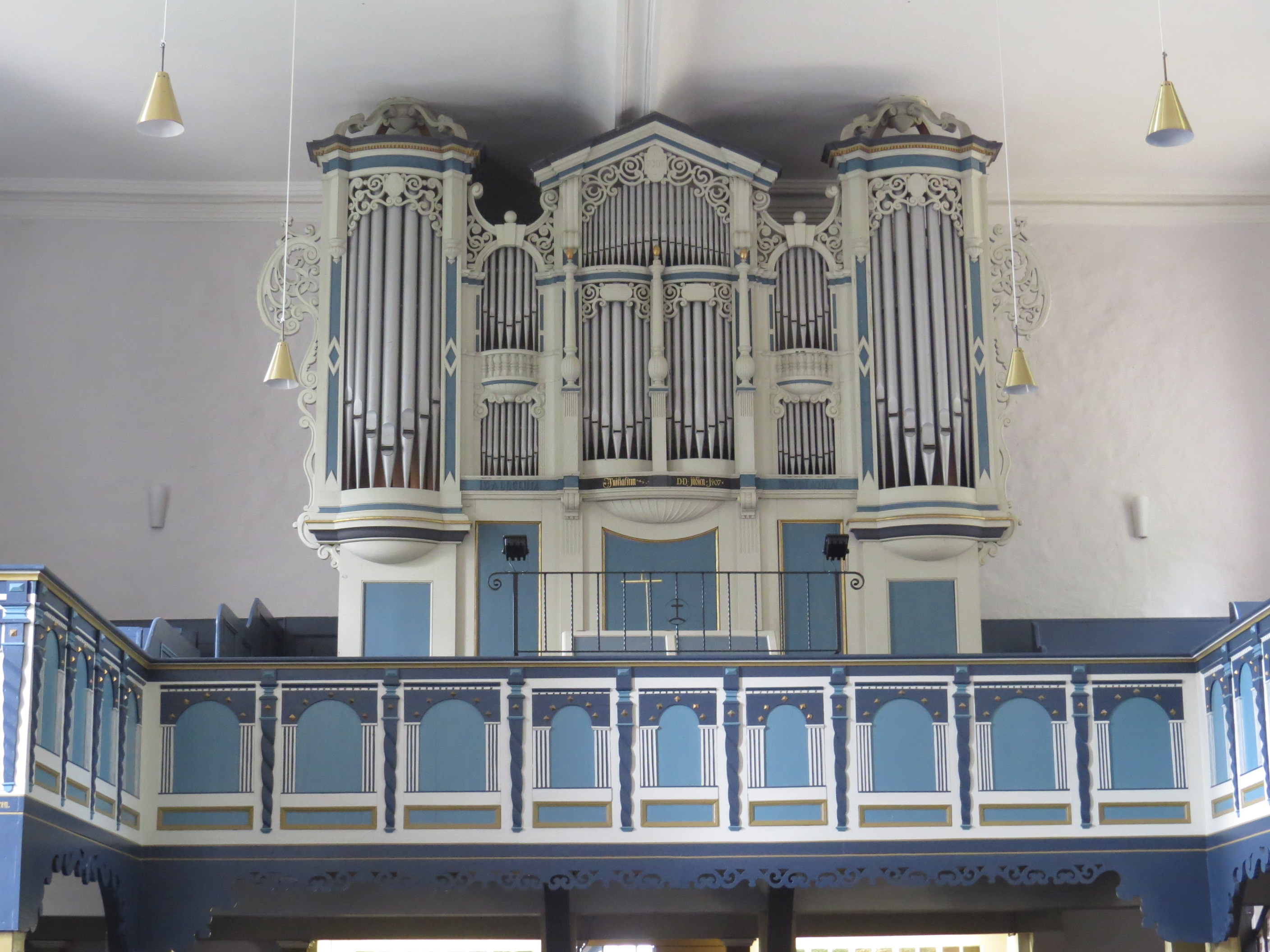 Inneres der ev. Kirche St. Johannes zu Lychen: Orgelprospekt auf der Empore